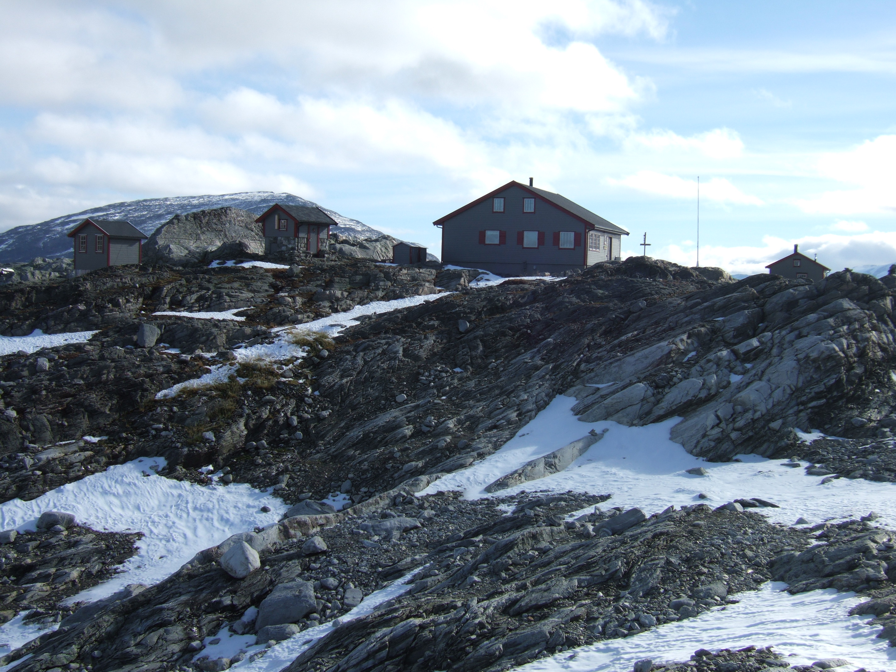 Danskehytta in Tafjordfjella, Norddal.